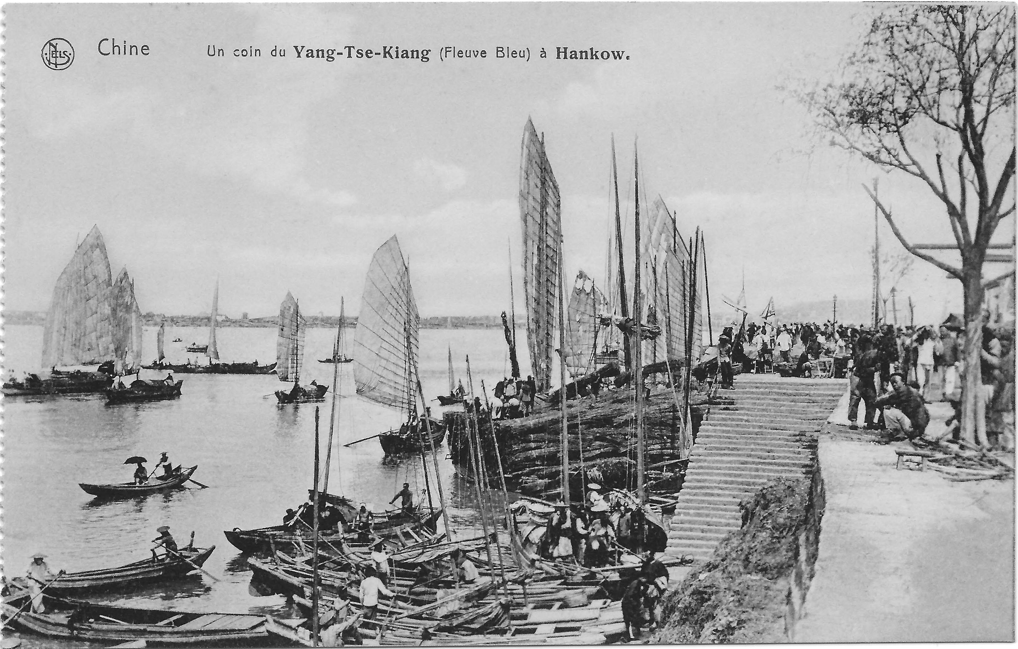 De rivier haven van Hankow